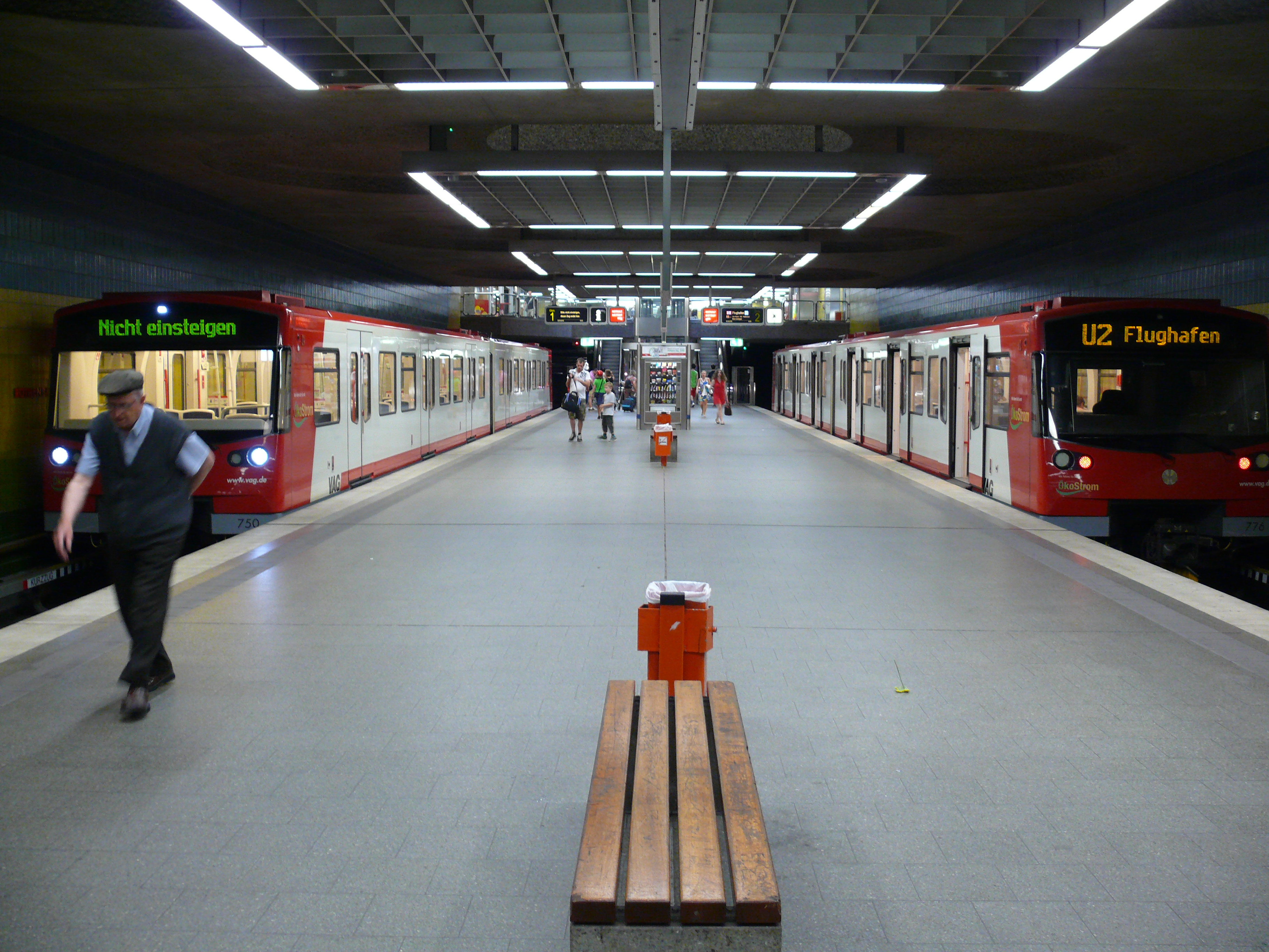 Links ein endender Zug der Linie U2 am U-Bahnhof Röthenbach in Nürnberg. Rechts ein weiterer U-Bahnhzug vom Typ DT3 der seine Fahrt zum Flughafen beginnt.